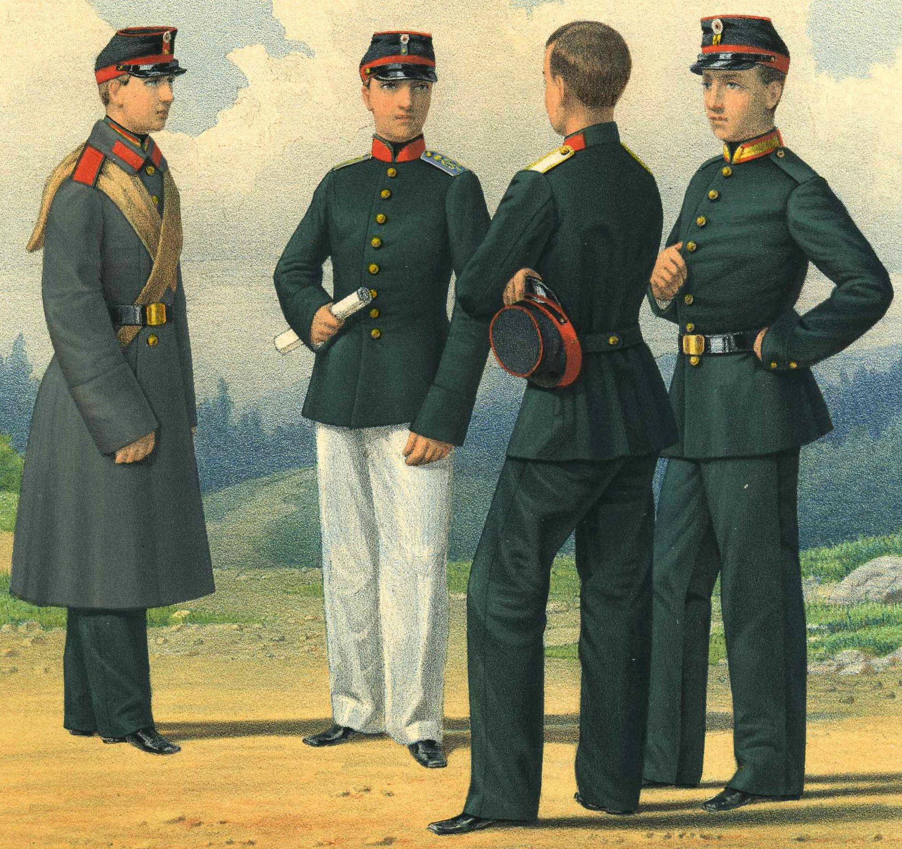 Воспитанники военных гимназий, 1876 г.